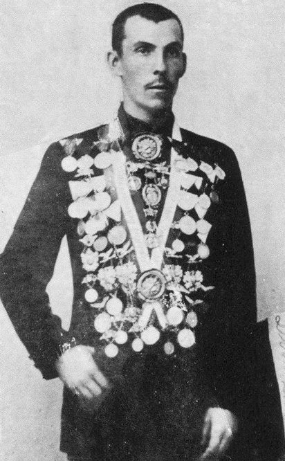 Yugoslav Inventor Ivan Sarić (In Hungarian: János Szárits)